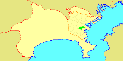 Map of Minami-ku, Yokohama, Kanagawa-prefecture, Japan